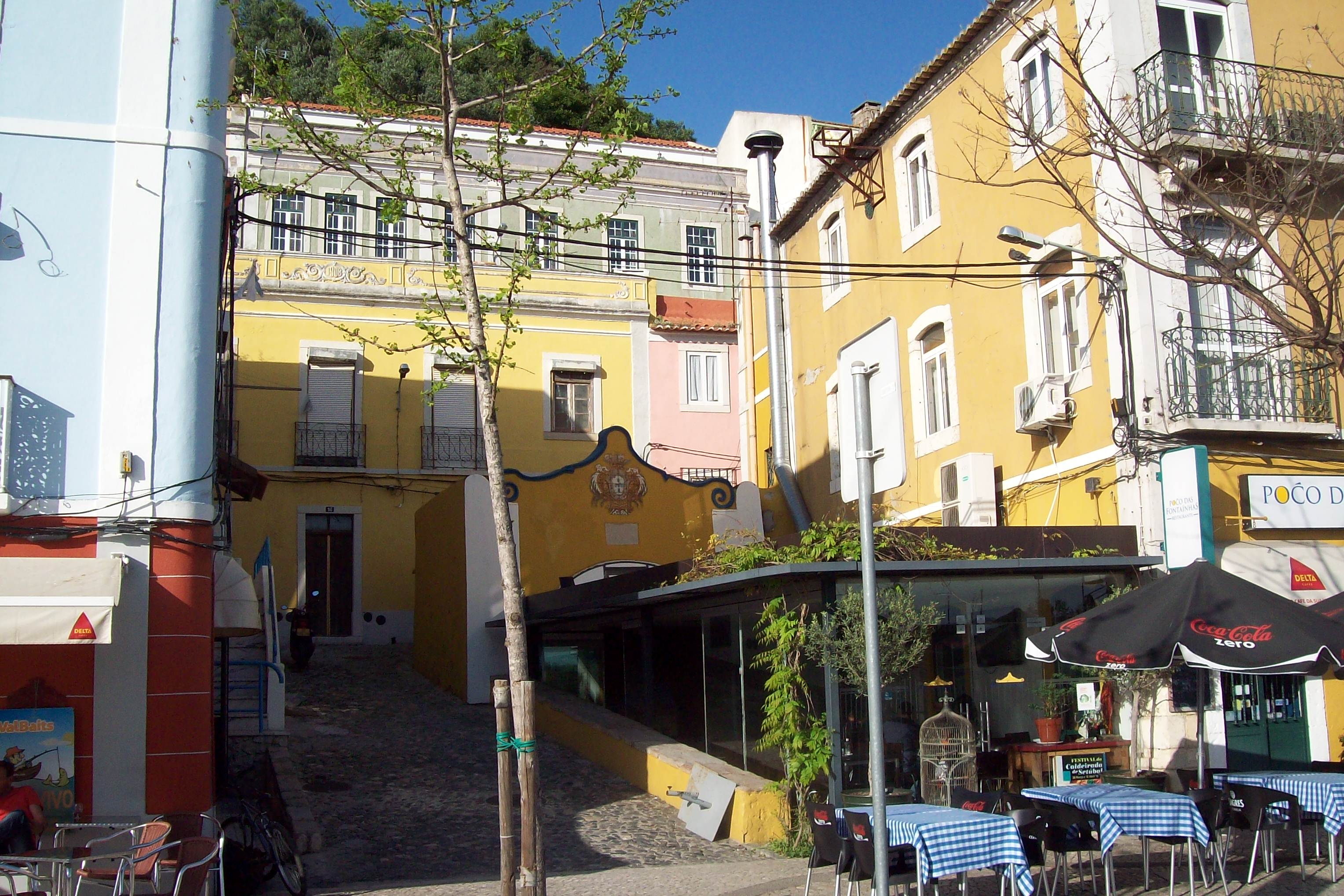 Zona ribeirinha do bairro das Fontaínhas - Setúbal